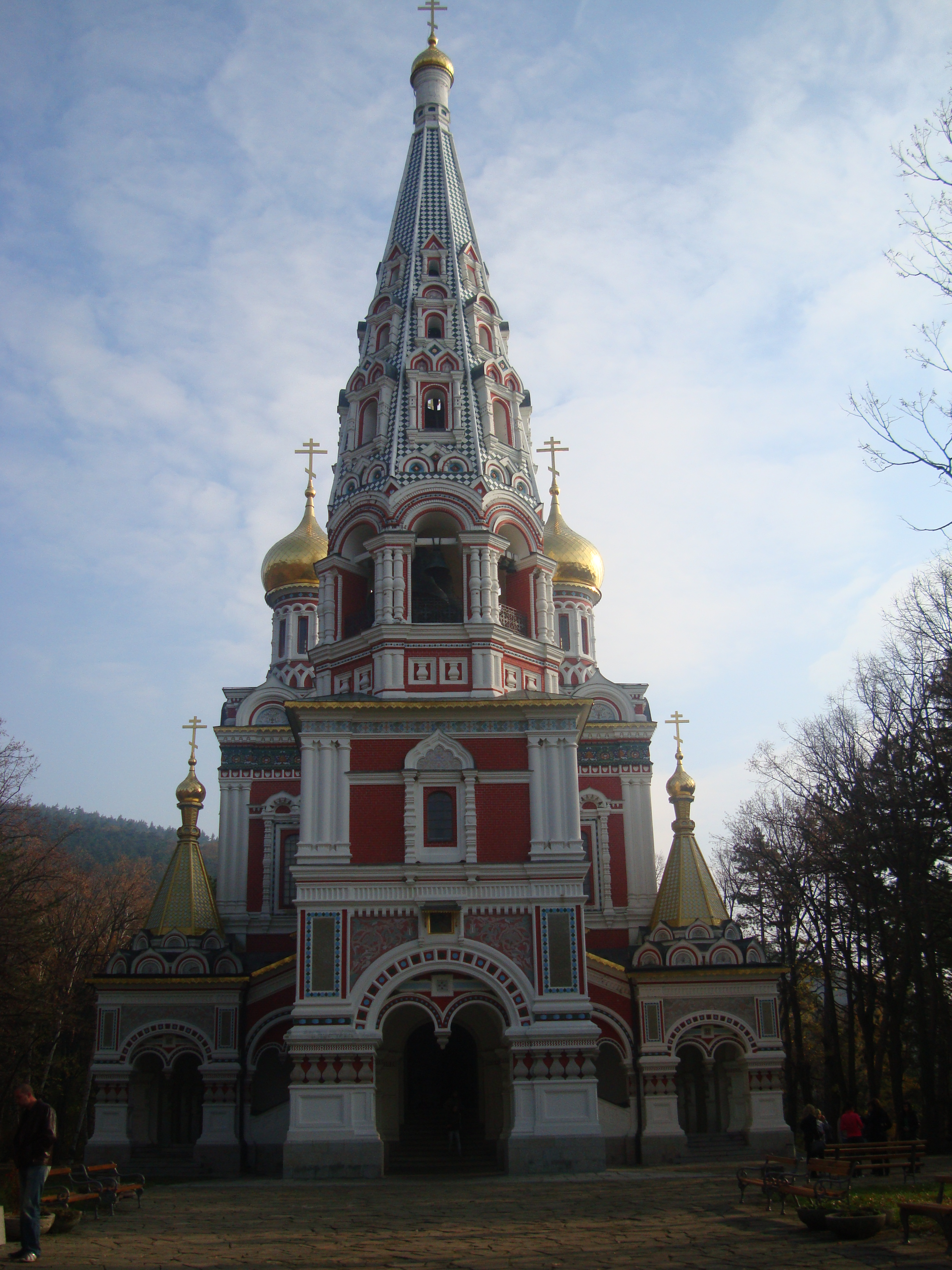 Шипченският манастир, известен още като „Рождество Христово“ , е православна църква в северозападните покрайнини на град Шипка. Манастирът е построен в памет на руските войници, загинали през Руско-турската освободителна война.